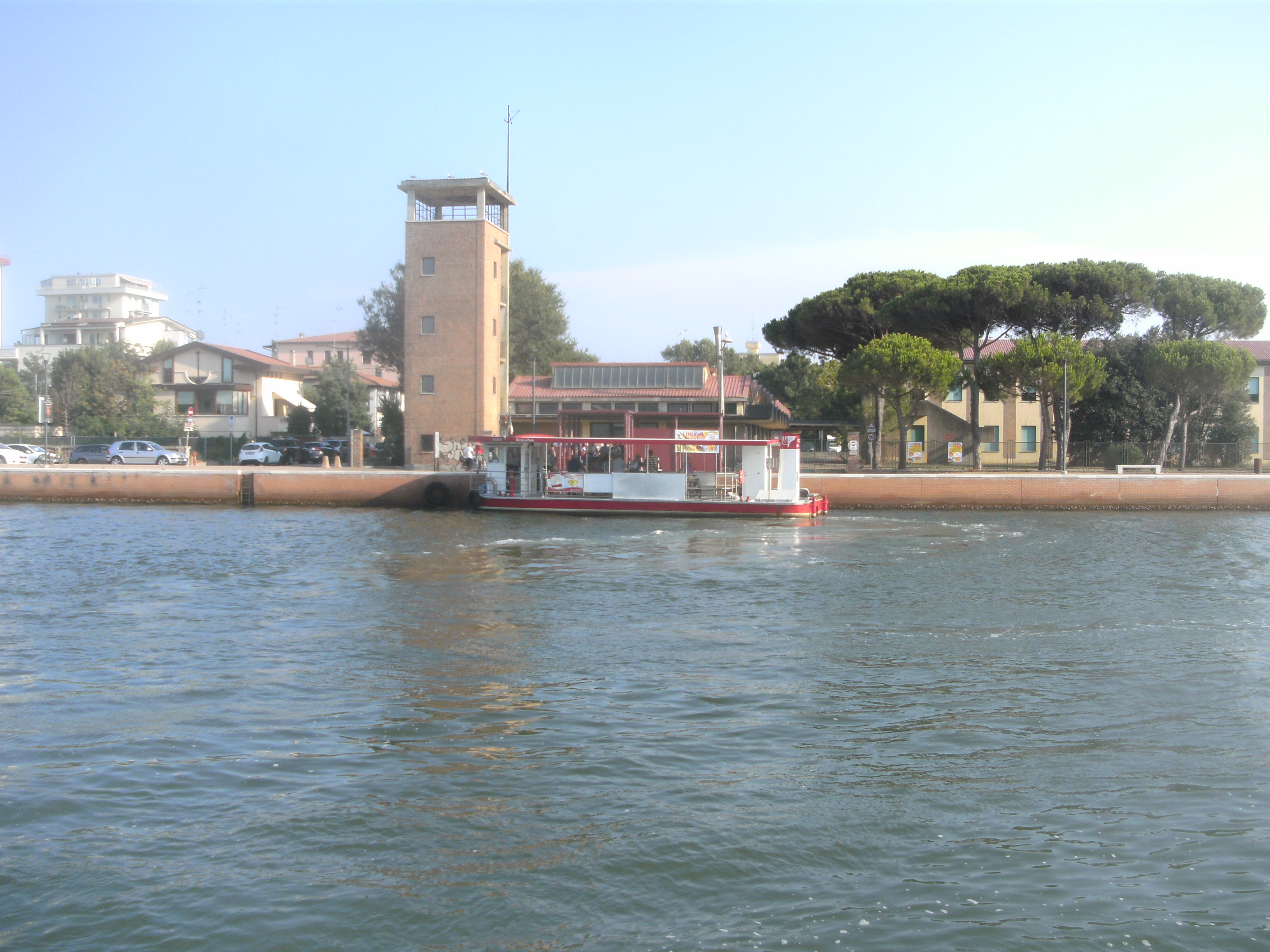 Porto Garibaldi (Comacchio, Fe), Italien, Anlegestelle der Personenfähre am Kanal Magnavacca auf der Seite von Lido degli Estensi, von Porto Garibaldi aus gesehen